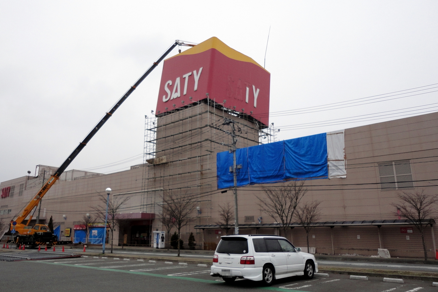 東日本大震災後のイオン一関店、看板撤去前